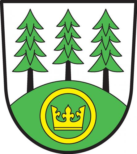 Proseč pod Křemešníkem, znak obce